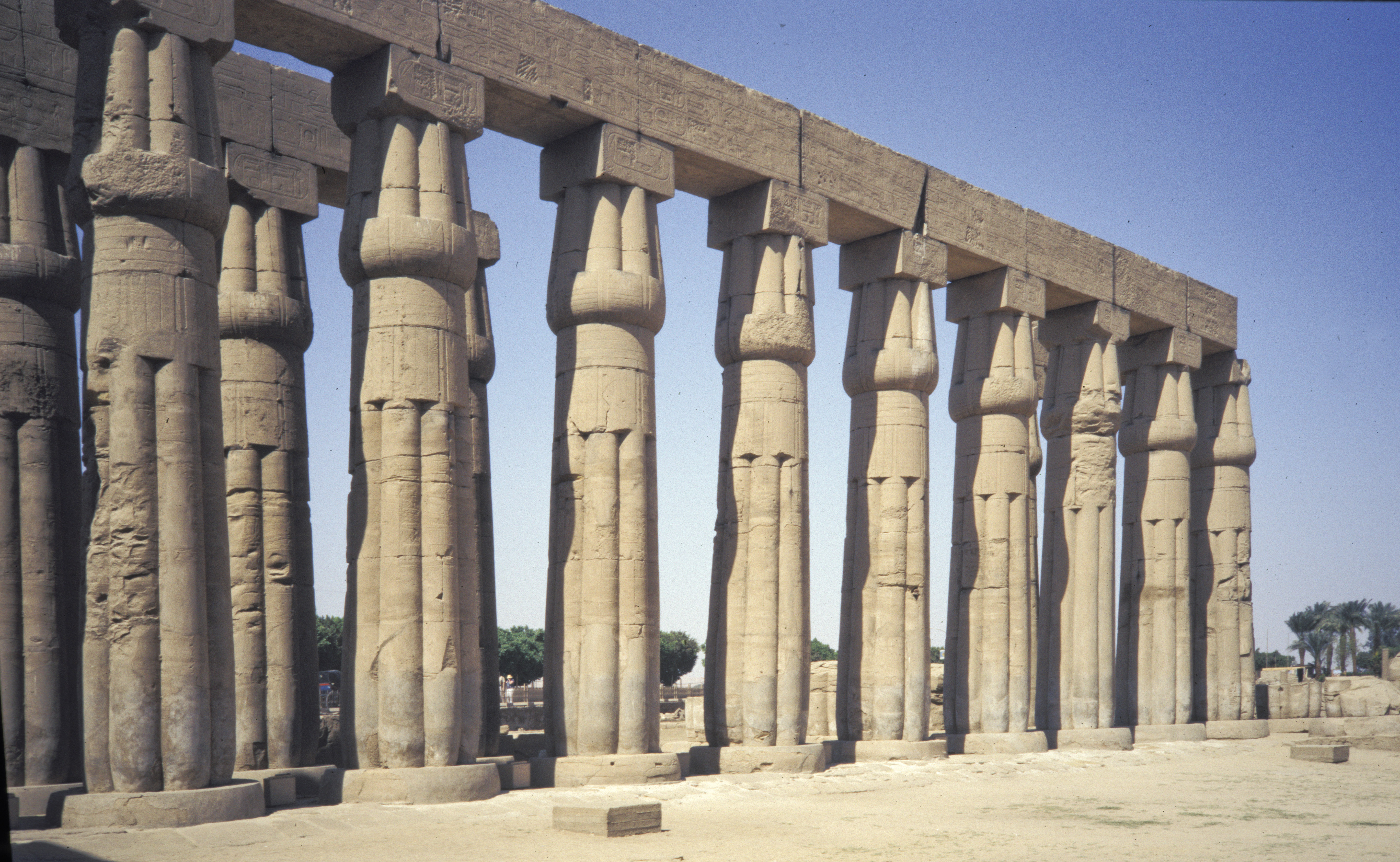 Egypt